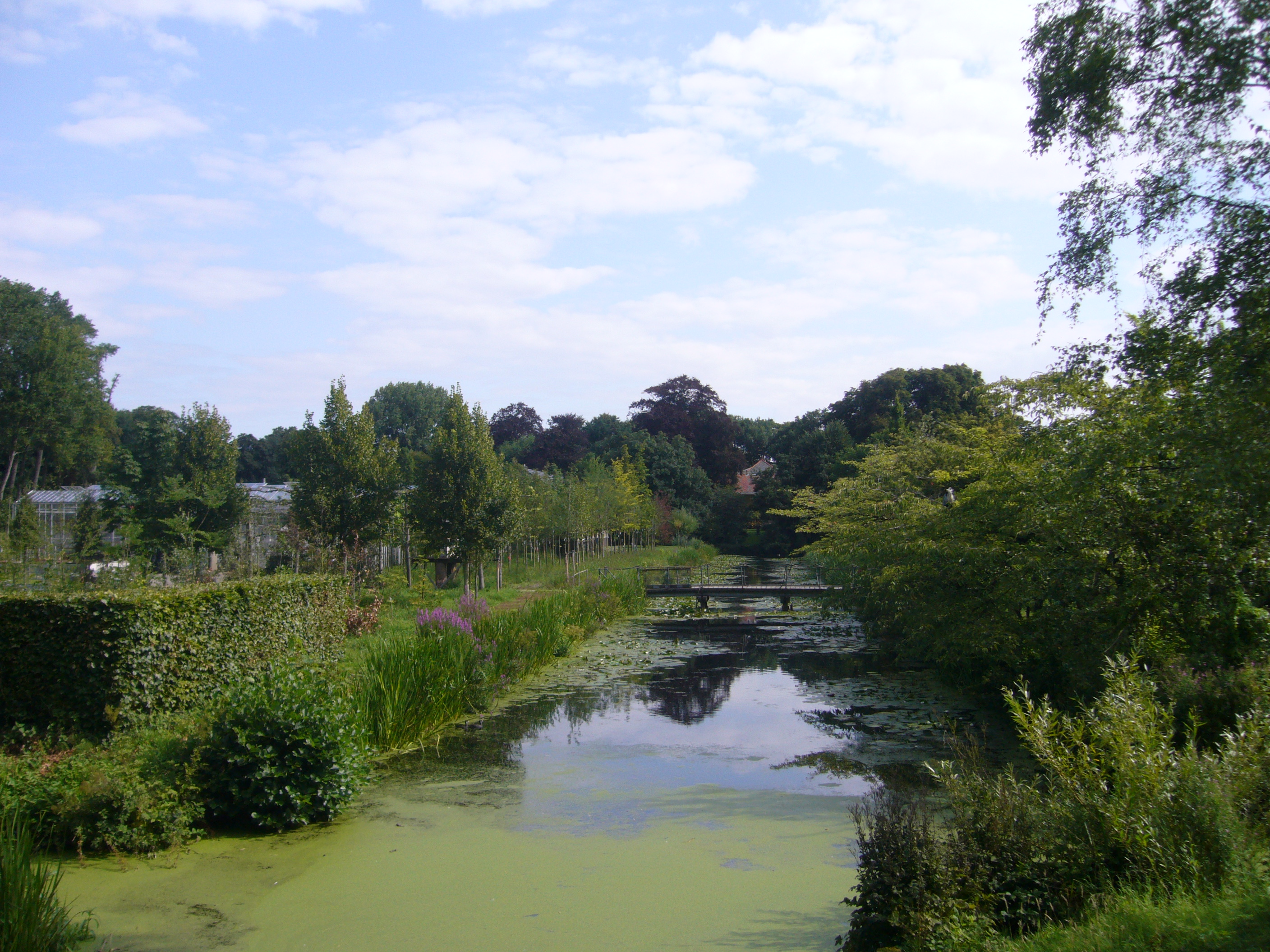 De Sprang (kanaaltje) loopt door de Haagse gemeentekwekerij naar de Raamweg